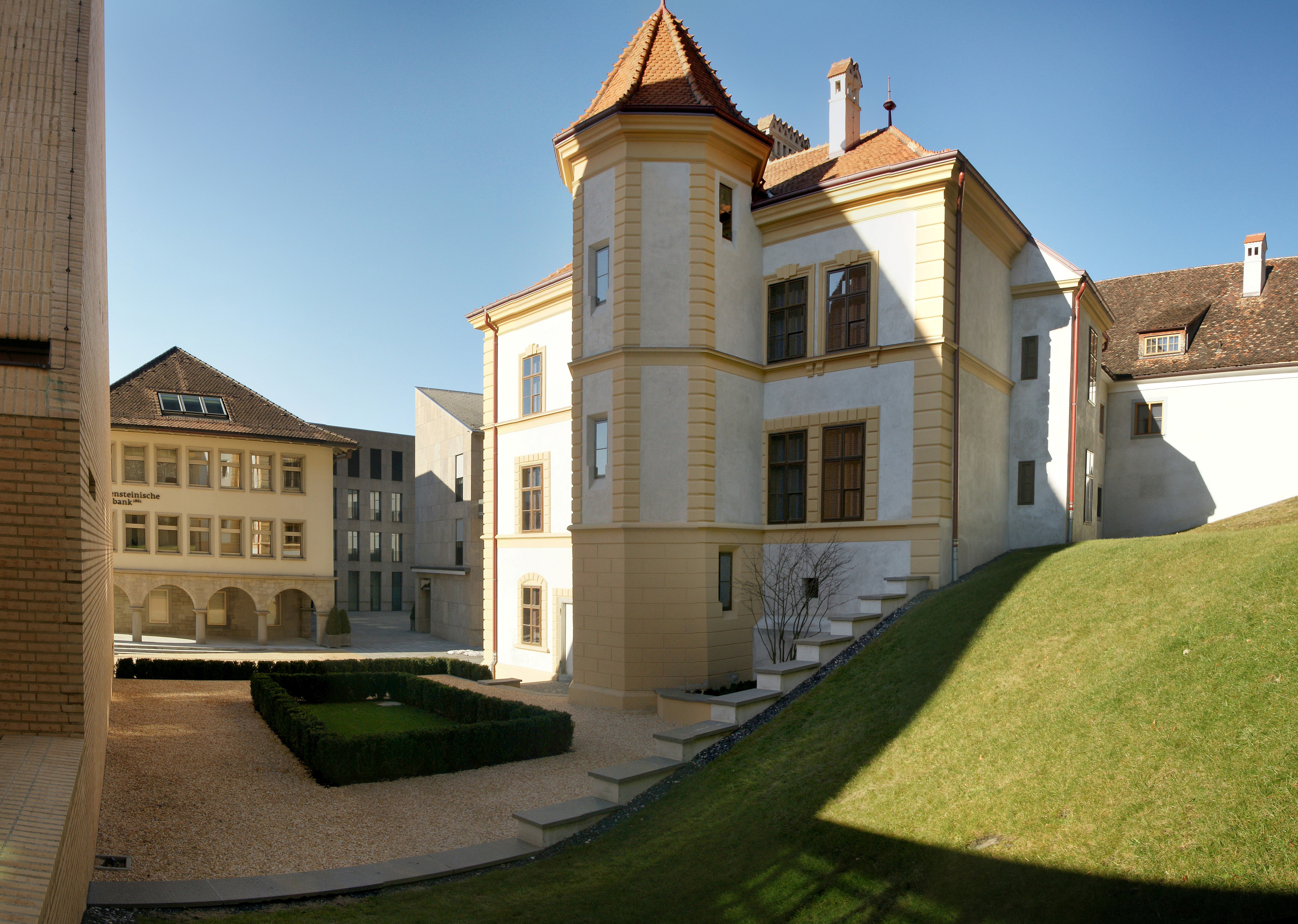 Panorama aus mehreren Bilder. Im Regierungsviertel des Liechtensteinischen Landtags u.a. das Gebäude der Liechtensteinischen Post AG mit der Philatelie ind links im Bild mit dem Walmdach die Liechtensteinische Landesbank.